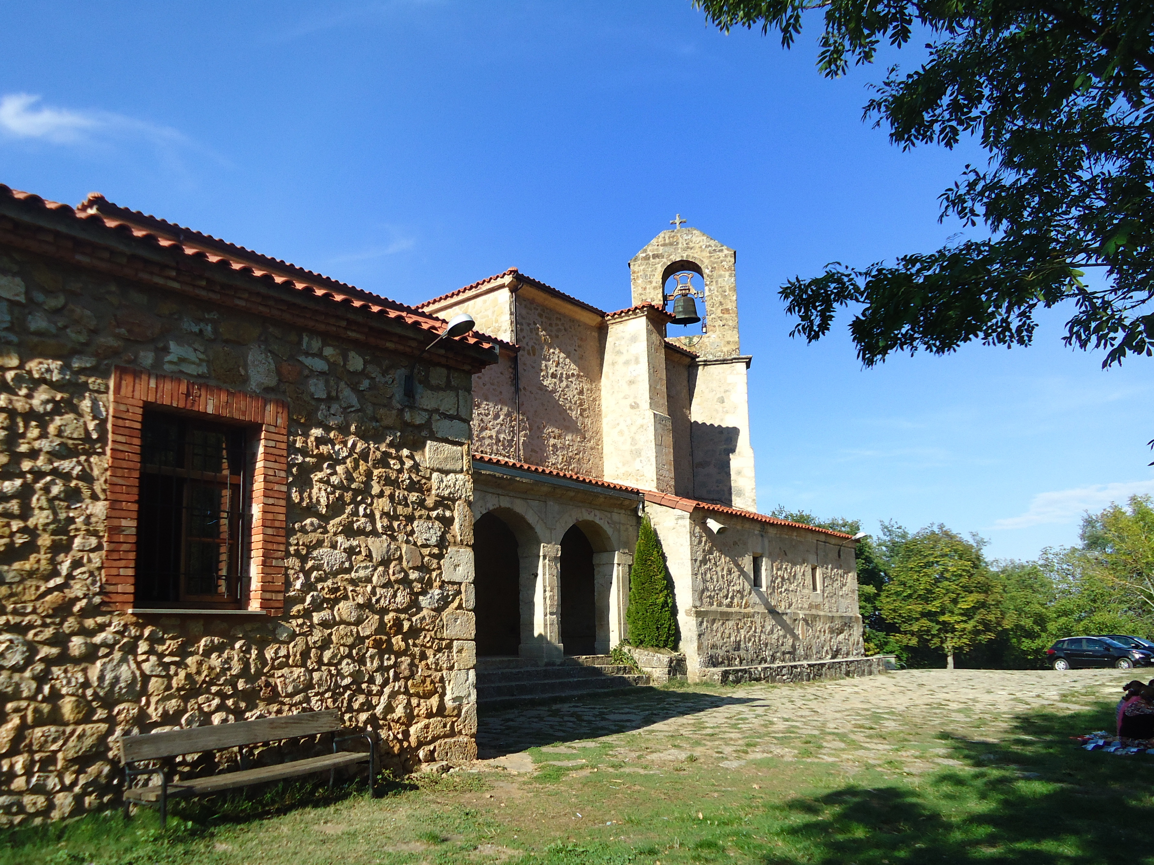 Bernedoko (Araba) Okongo baseliza